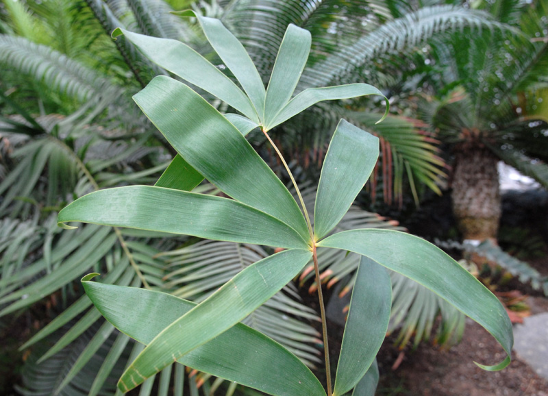 Ceratozamia hildae leaf